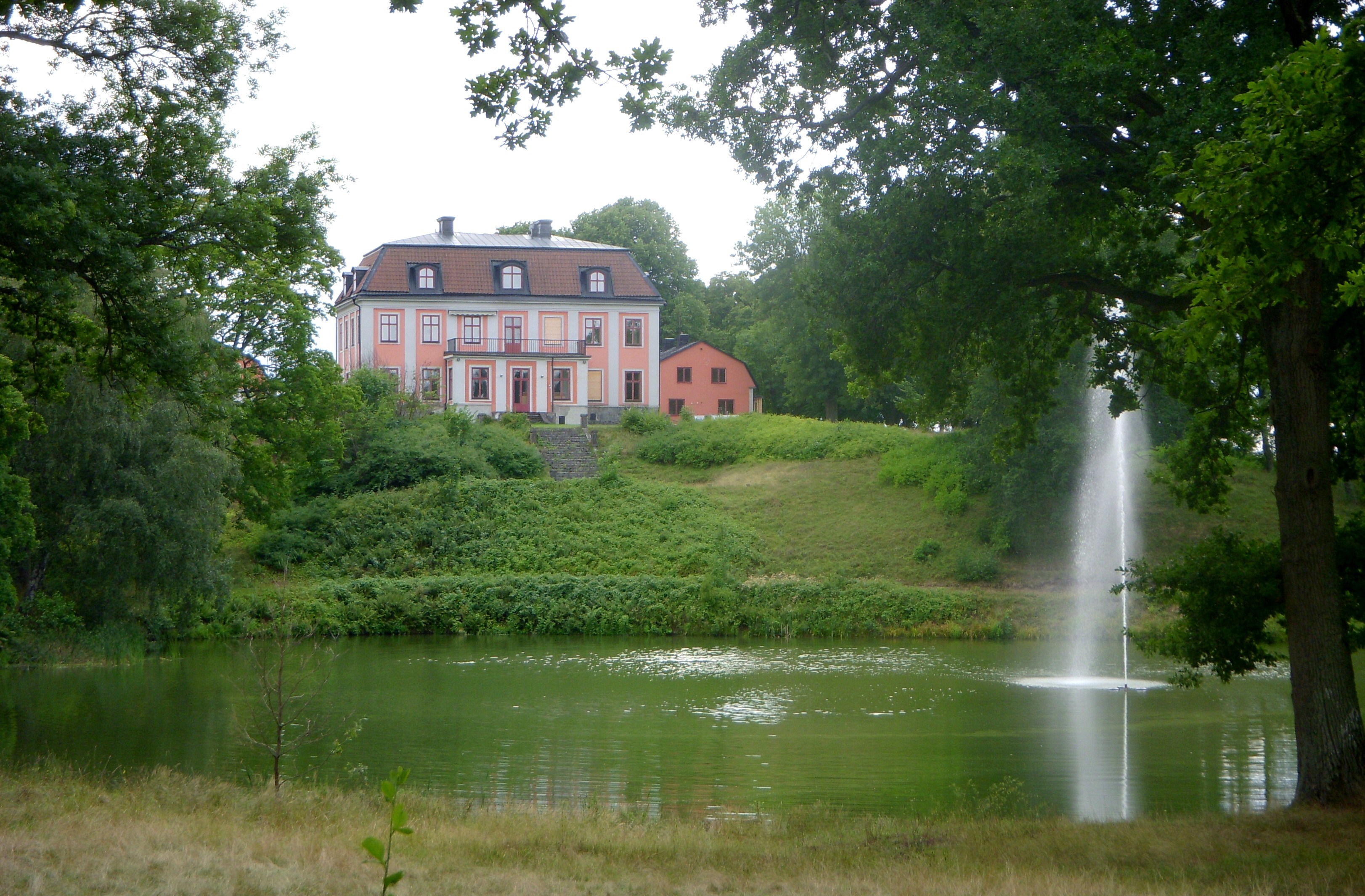 Kärsö gård, sidan mot parken, Ekerö kommun